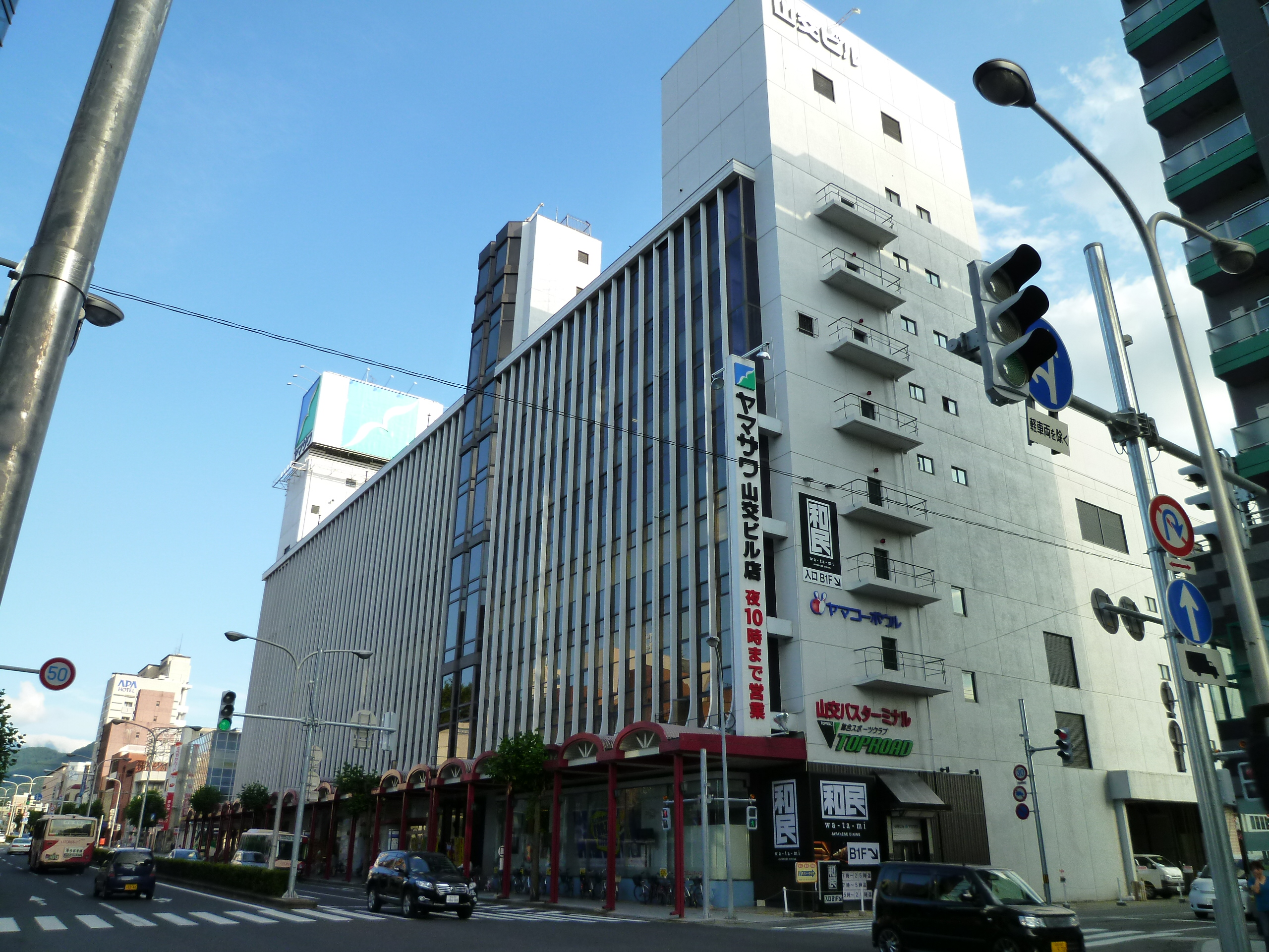 山交ビル、山交ビルバスターミナル北側（山形市香澄町）